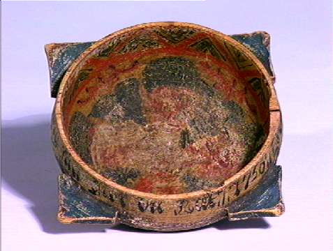 Snippebolle fra Nissedal i Telemark, datert 1753. Nå på Norsk Folkemuseum i Oslo. NF.1990-0977